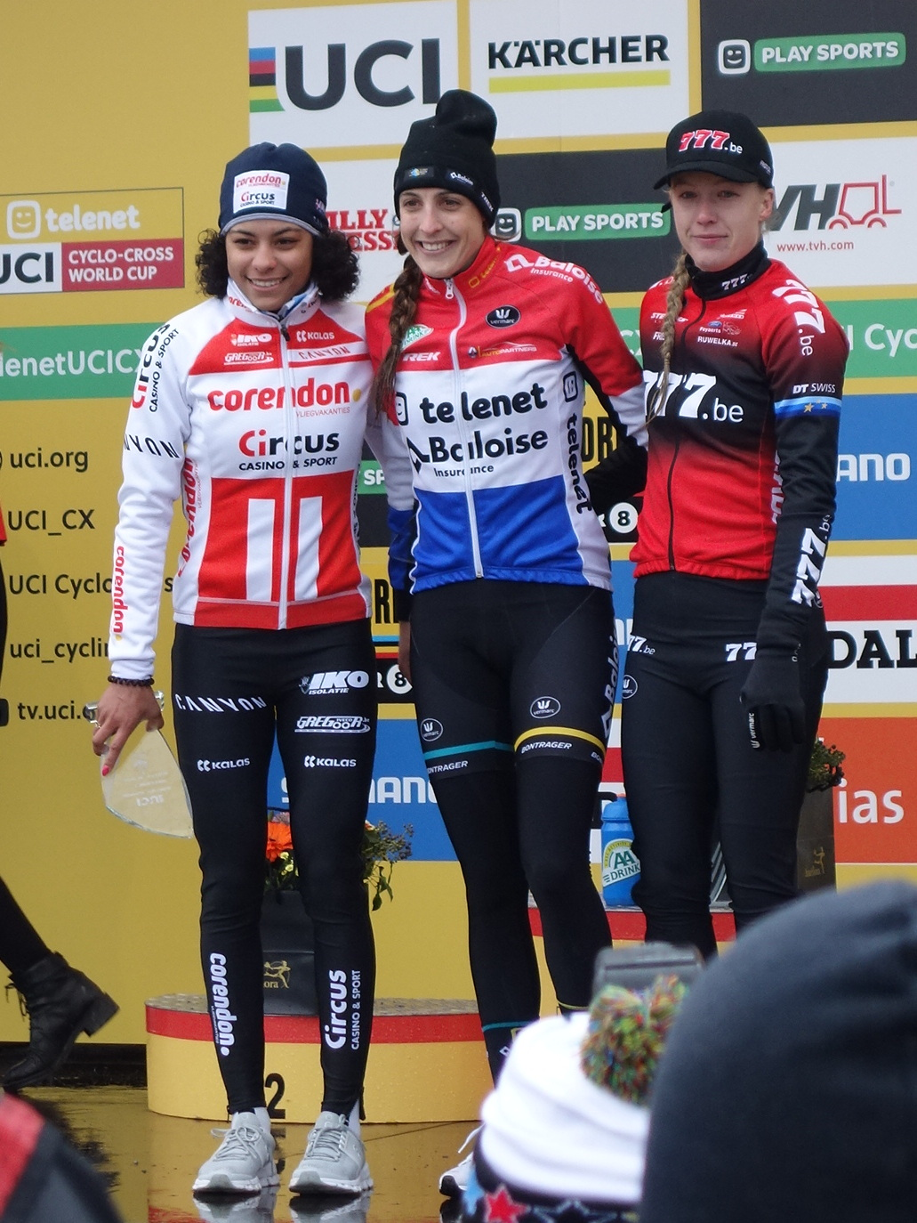 Podium van de vrouwen wereldbeker veldrijden op de Citadel van Namen op zondag 22 december 2019